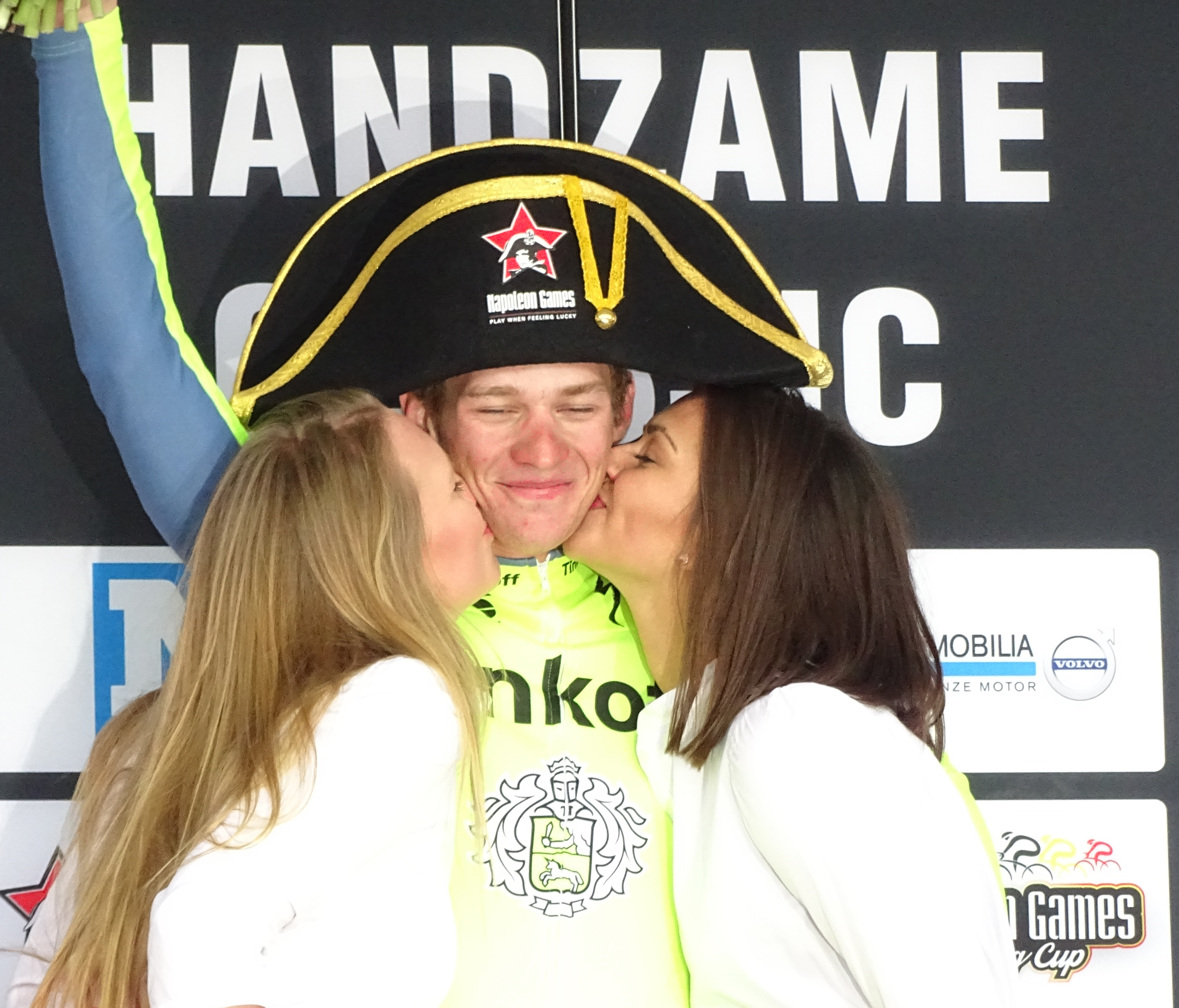 Reportage réalisé le vendredi 18 mars à l'occasion de l'arrivée de la Handzame Classic 2016 à Bredene (Kortemark), Belgique.